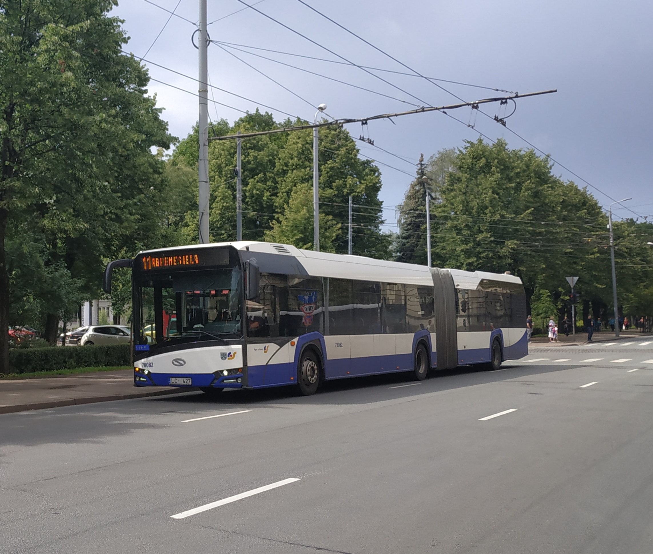 Solaris Urbino IV 18 circulant à Riga